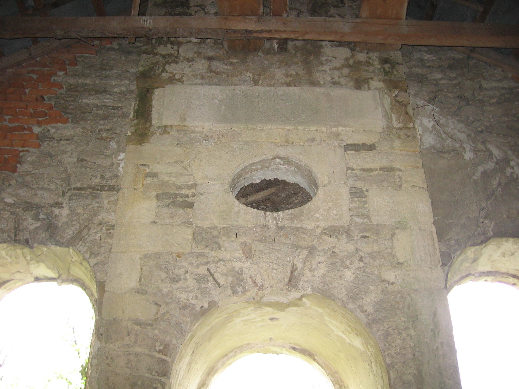 Усипальниця Ценських у Вікні на Покутті. Внутрішній стан.